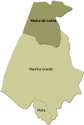 localisation de vieira de leiria sur la freguesia de marinha grande